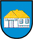 Herb Karchowic (gmina Zbrosławice, powiat tarnogórski, województwo śląskie, Polska)